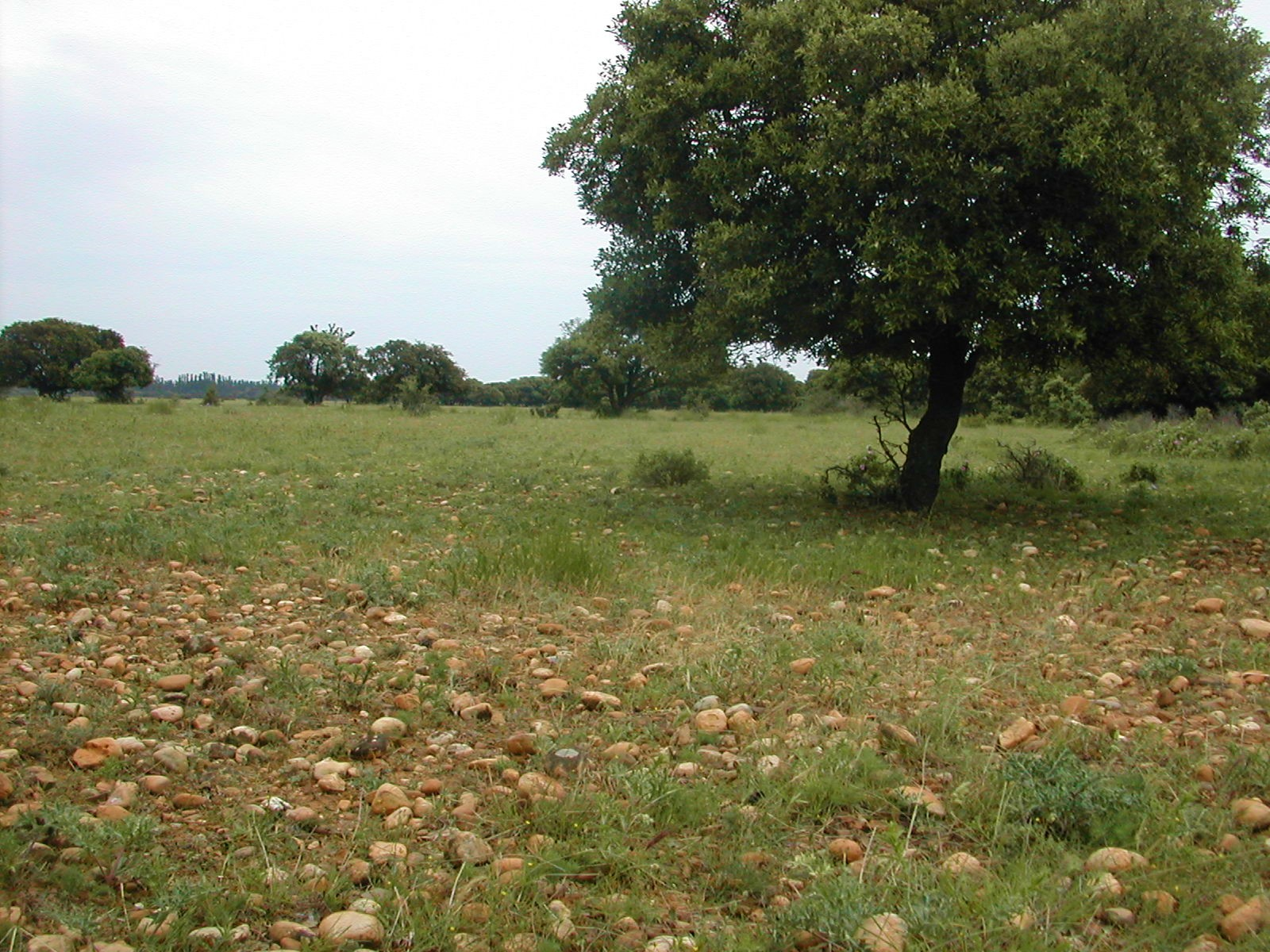 La Crau